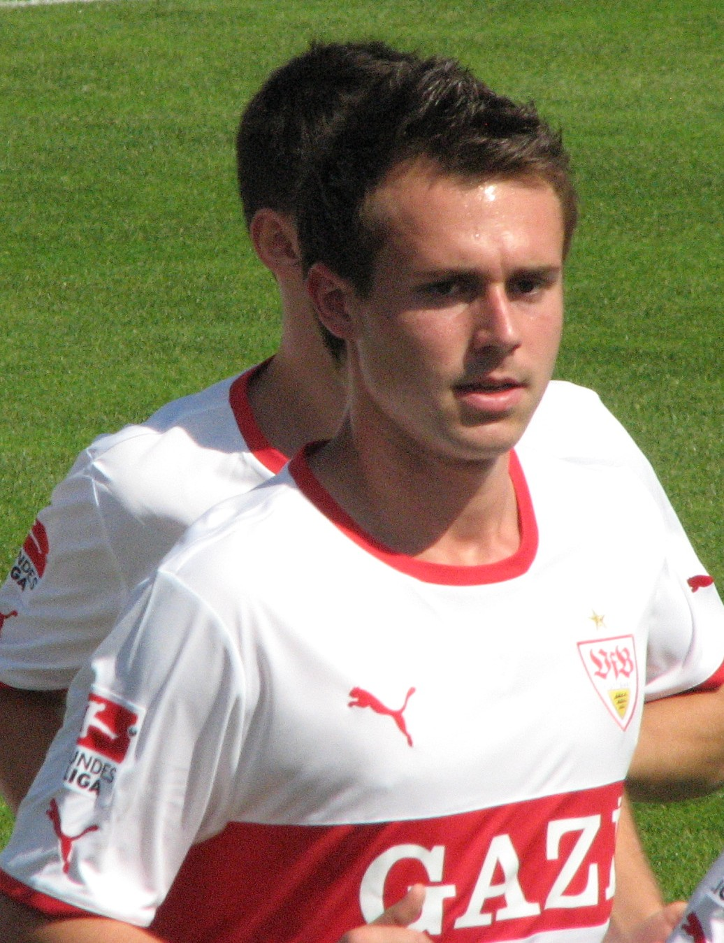 Pascal Breier beim Auftakttraining 2011. Aufgenommen von